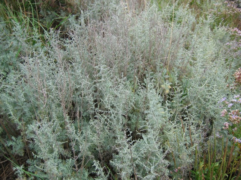 Strand-Beifuß Artemisia maritima, Wismarbucht